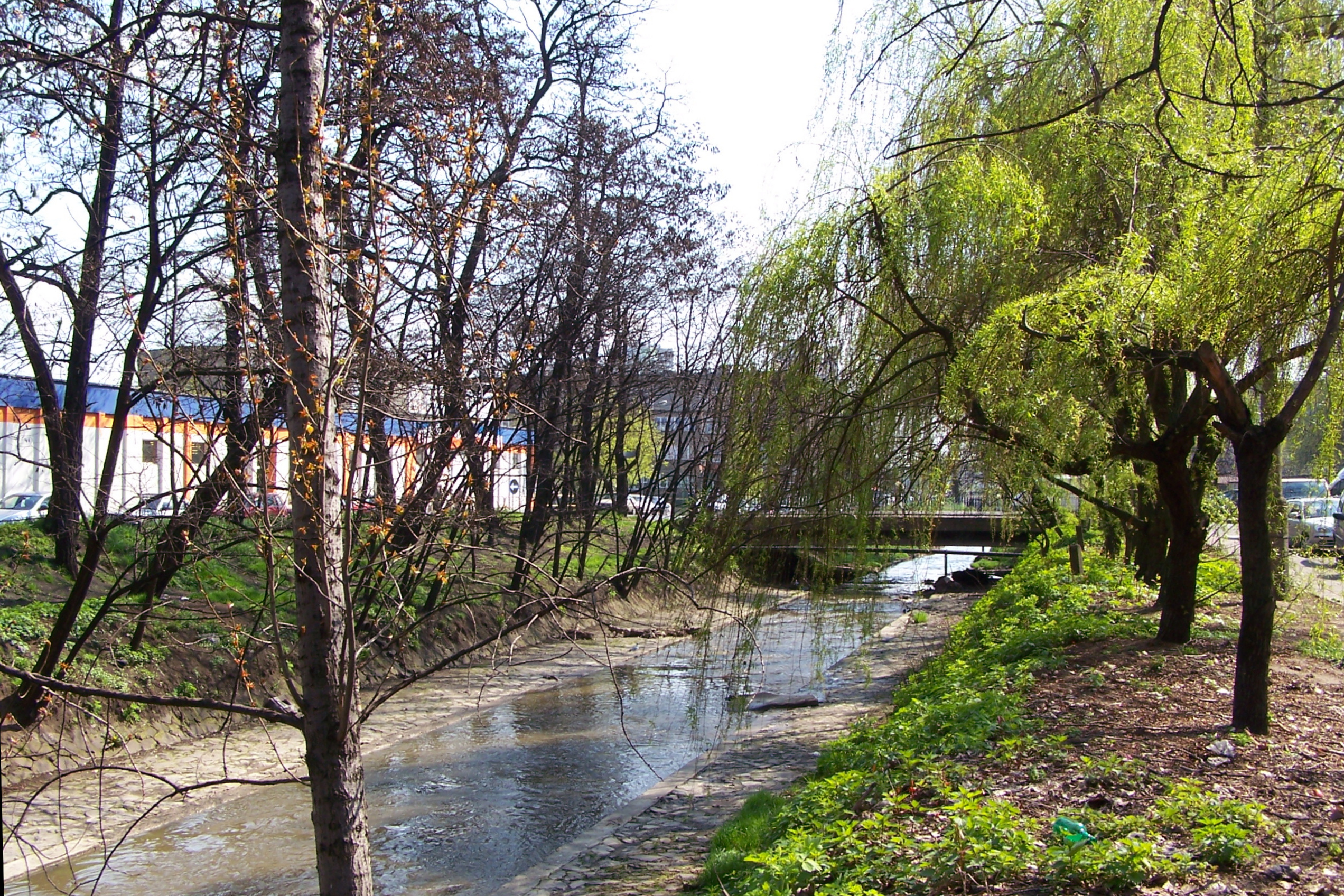 Rzeka Rawa przepływająca przez Katowice. Zdjęcie wykonano na wysokości ul. Moniuszki.